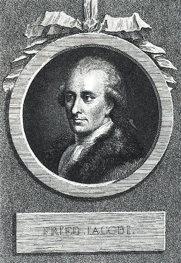 Portrait des Philosophen Friedrich Heinrich Jacobi.